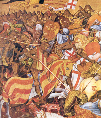 Retablo de San Jorge, Marzal de Sax, Victoria and Albert Museum, Londres